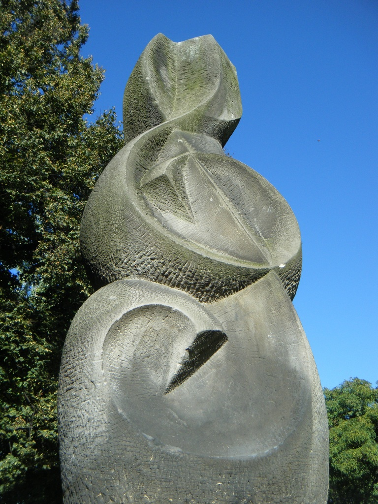 Rzeźba Warszawska Jesień w pobliżu Uniwersytetu Muzycznego im. Fryderyka Chopina w Warszawie na skwerze Bohdana Wodiczki. Wykonana w 1975 roku przez Karola Tchorka.